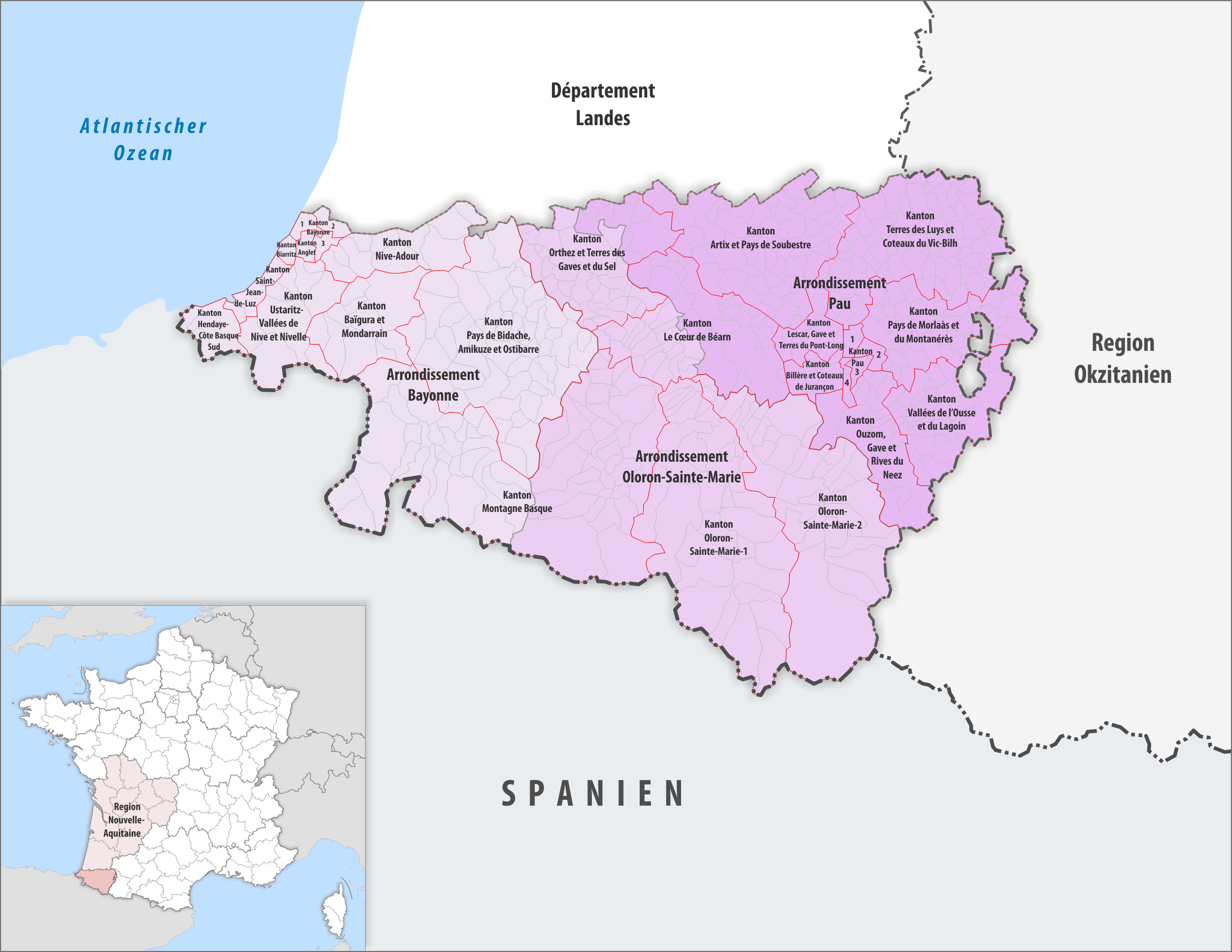 Gemeinden, Kantone und Arrondissemente im Departement Pyrénées-Atlantiques